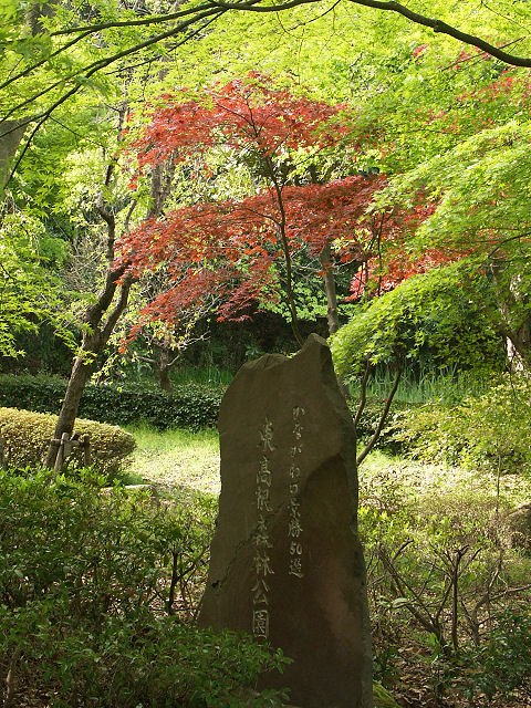 新緑と「新紅」が眩しい春の東高根。